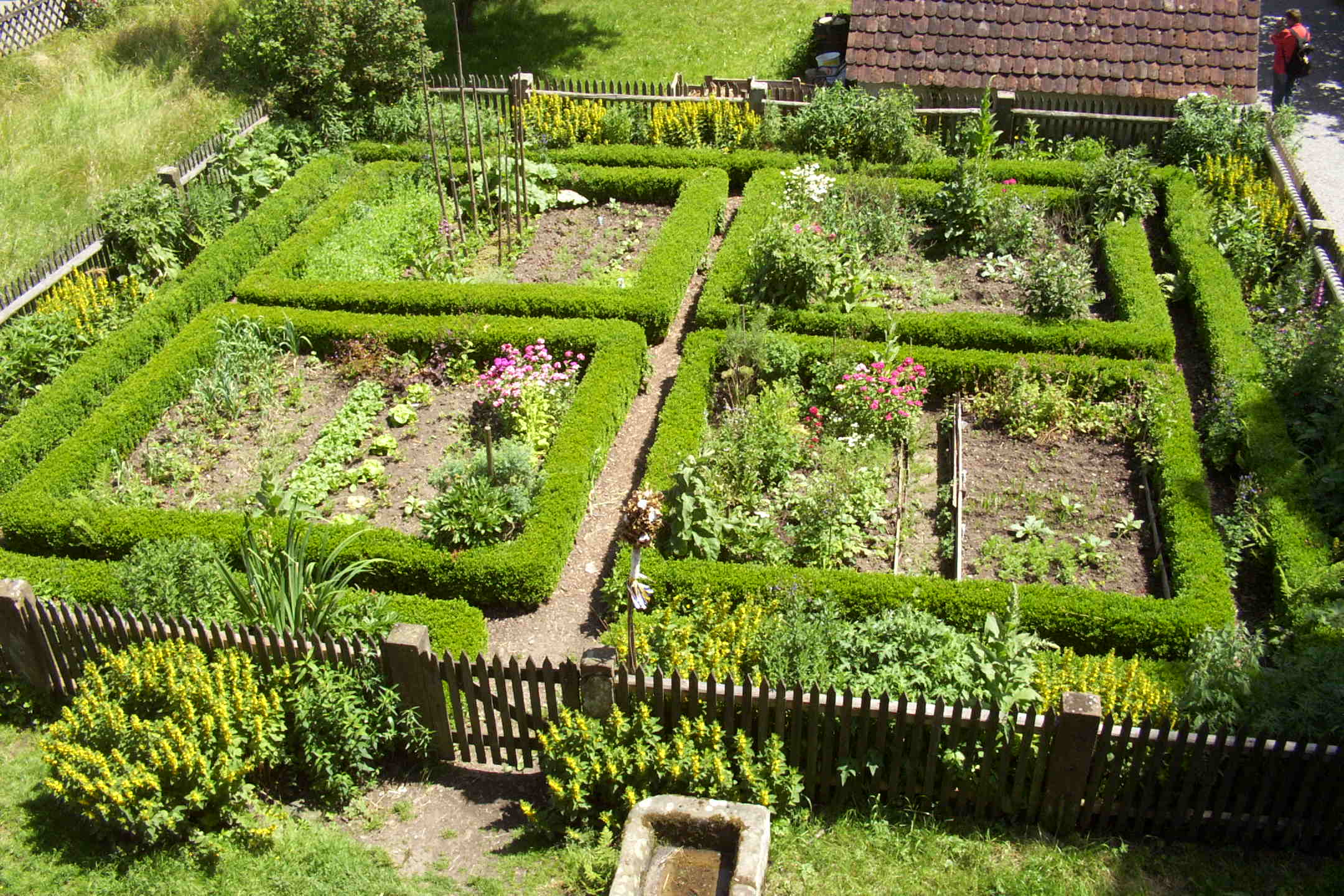 Bauerngarten im Freilichtmuseum Vogtsbauernhof/Schwarzwald